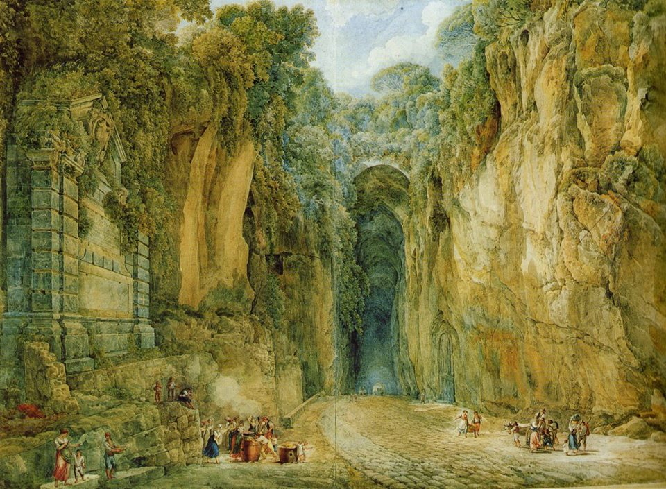 Abraham-Louis-Rodolphe Ducros- La Crypta Neapolitana. Musée cantonal des beaux-arts, Lausanne